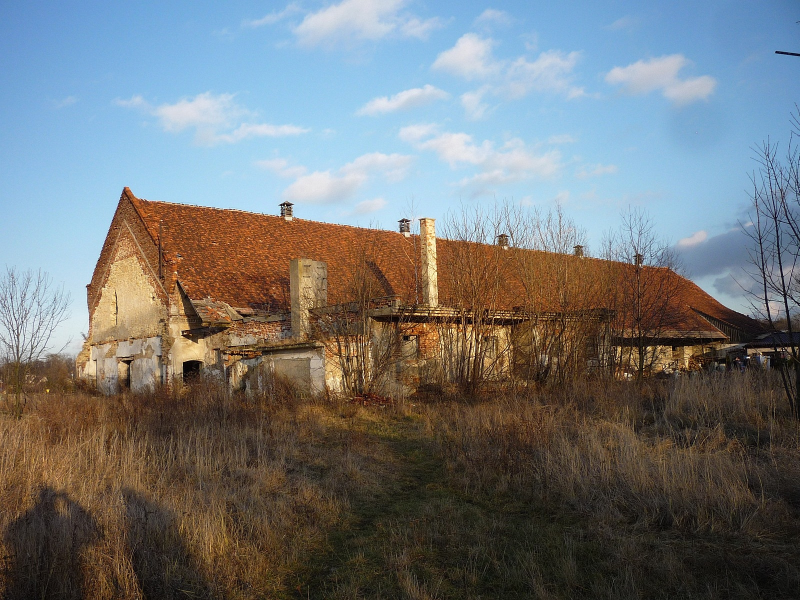 Suche Łany - tu była stadnina koni